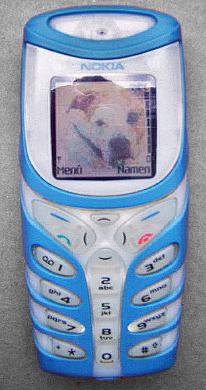 Nokia 5100 mobile phone blue